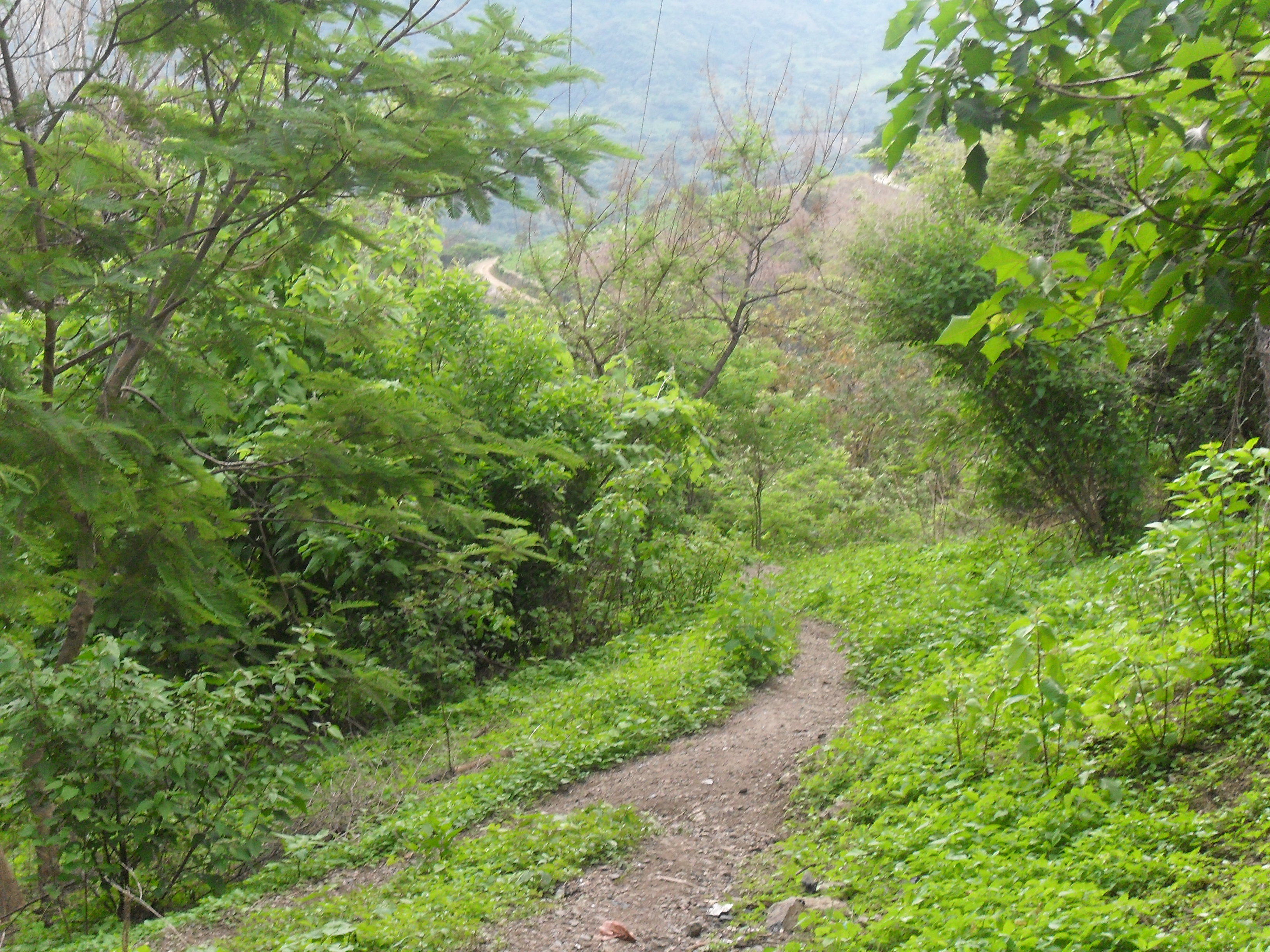 Es tambien una imagen de la vegetacion que disfrutamos en tiempos dee lluvia en el Estado de Mexico